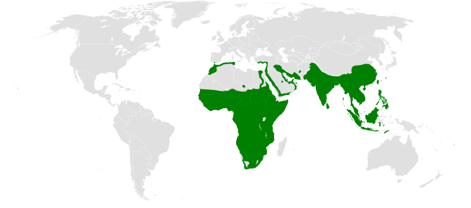 Pycnonotus distribution map